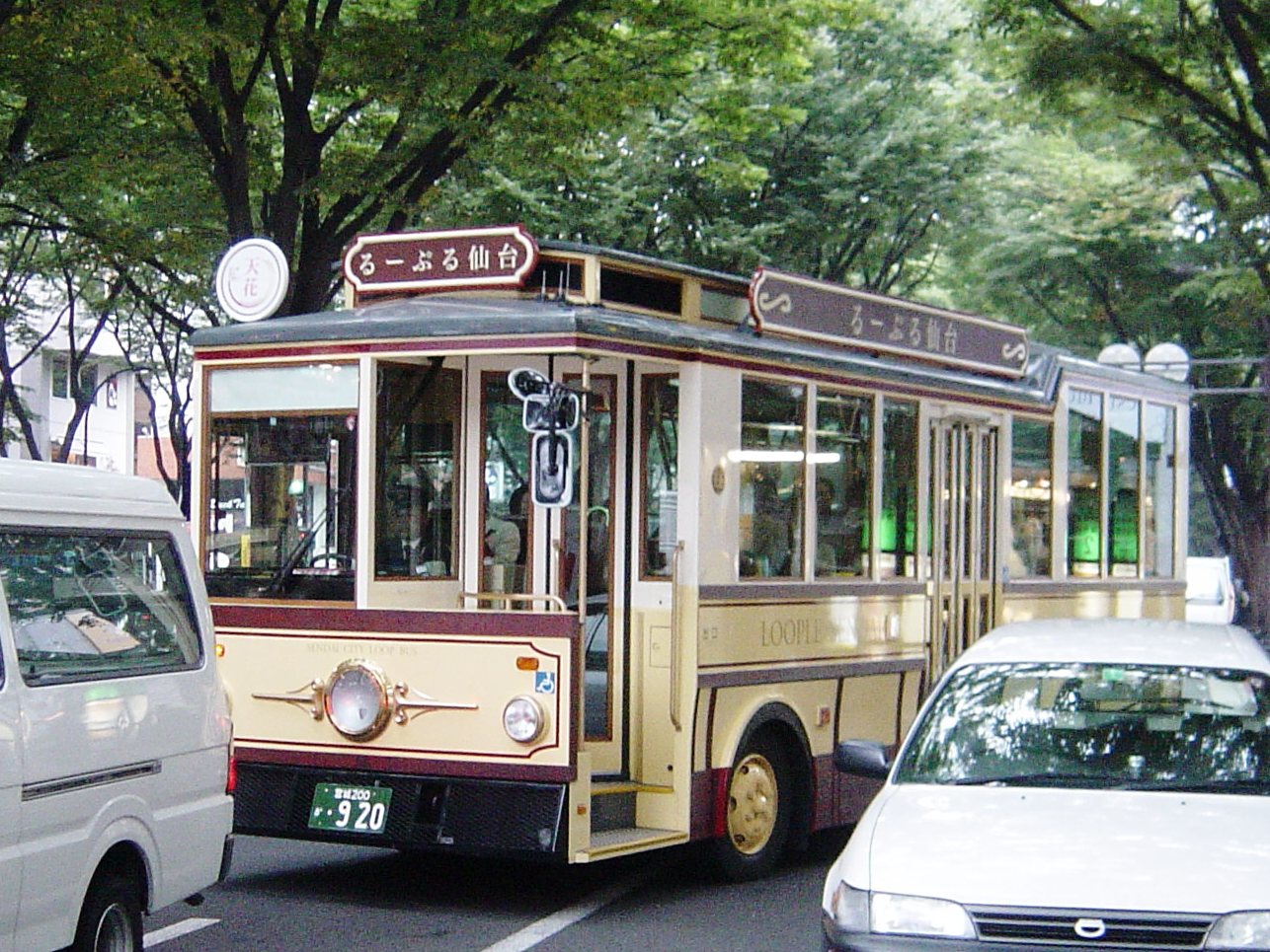 るーぶる仙台。この920号車は2016年度末に運用終了。